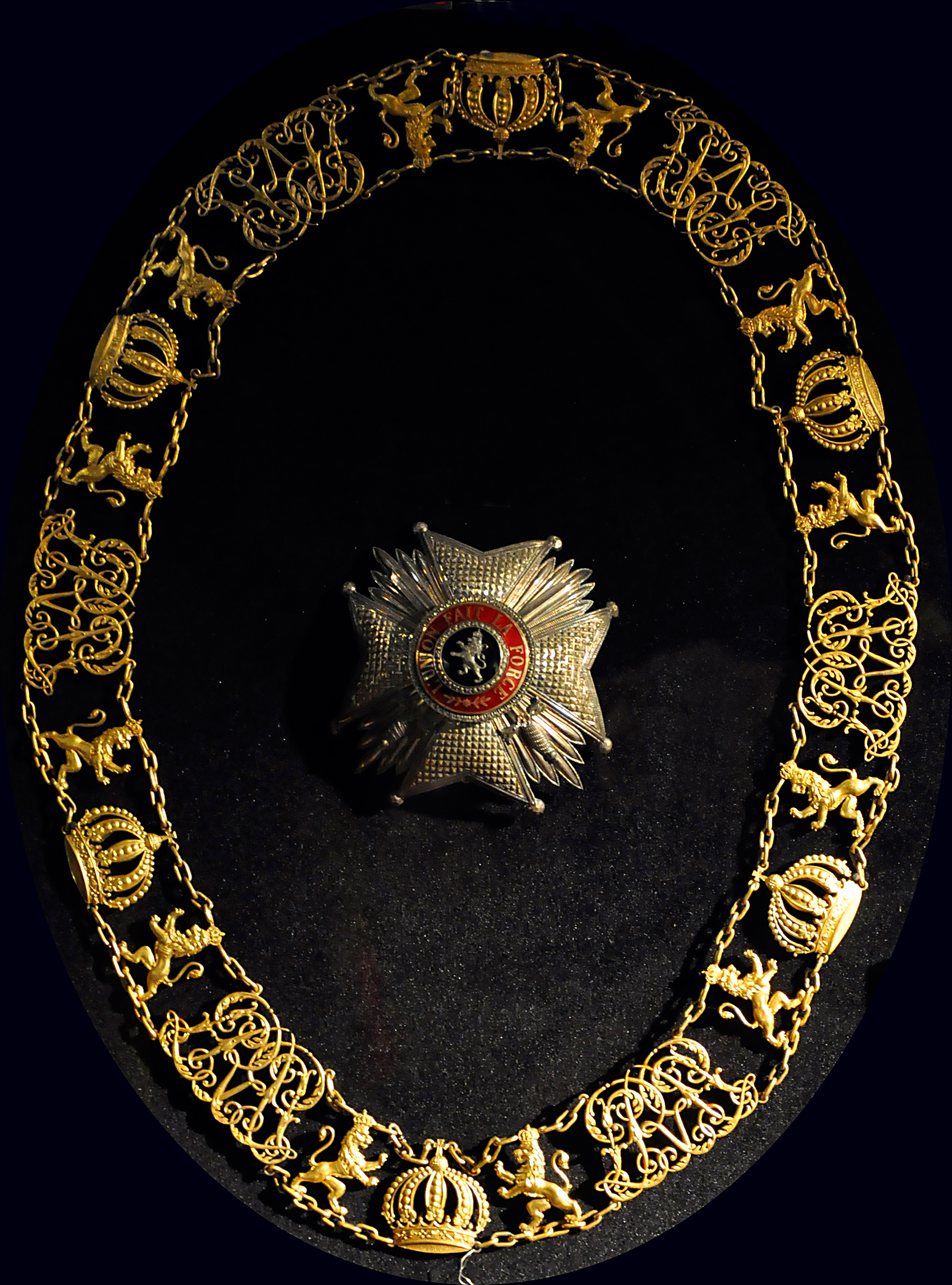 Keten van de Leopoldsorde en plaque van grootofficier van de Leopoldsorde in het Grand Curtius te Luik, België